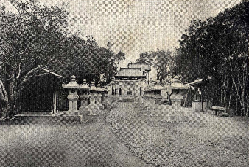 新豐社，位在今臺南市關廟區。圖片翻拍自1937年新豐郡役所出的《新豐郡要覽》。